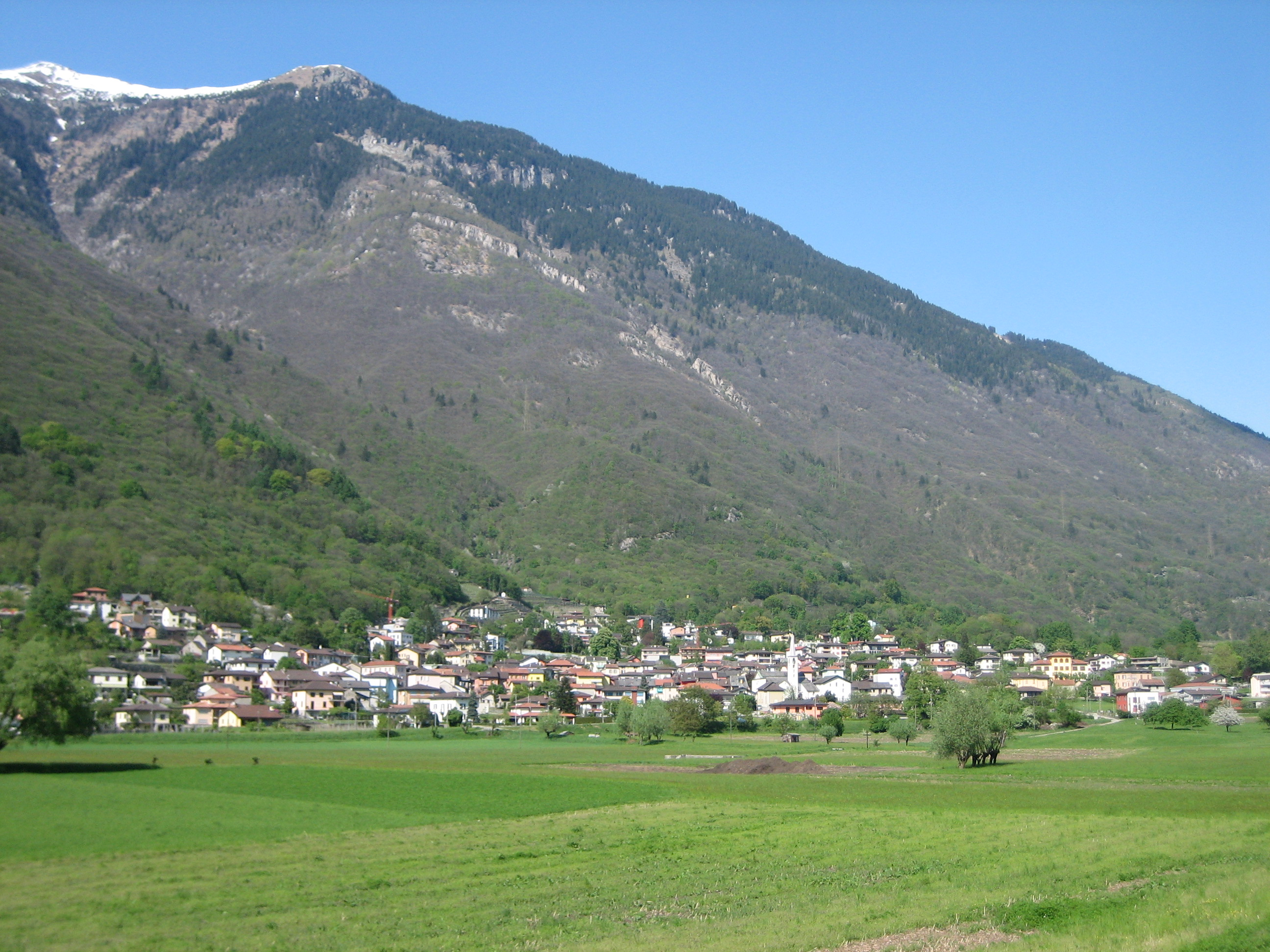 Lumino TI